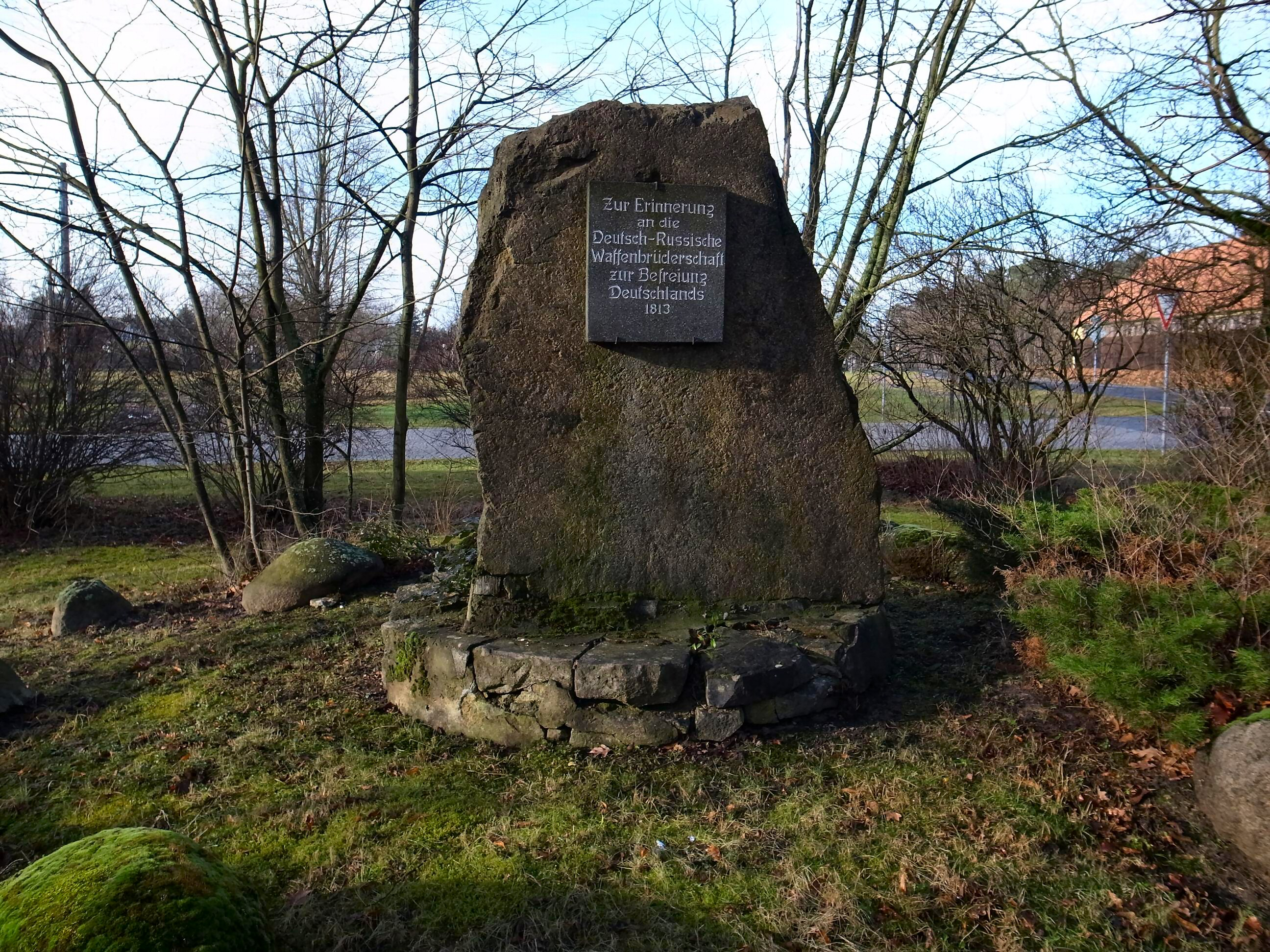 Oranienbaum_Gedenkstein_Deutsch-Russische_Waffenbrüderschaft_1813